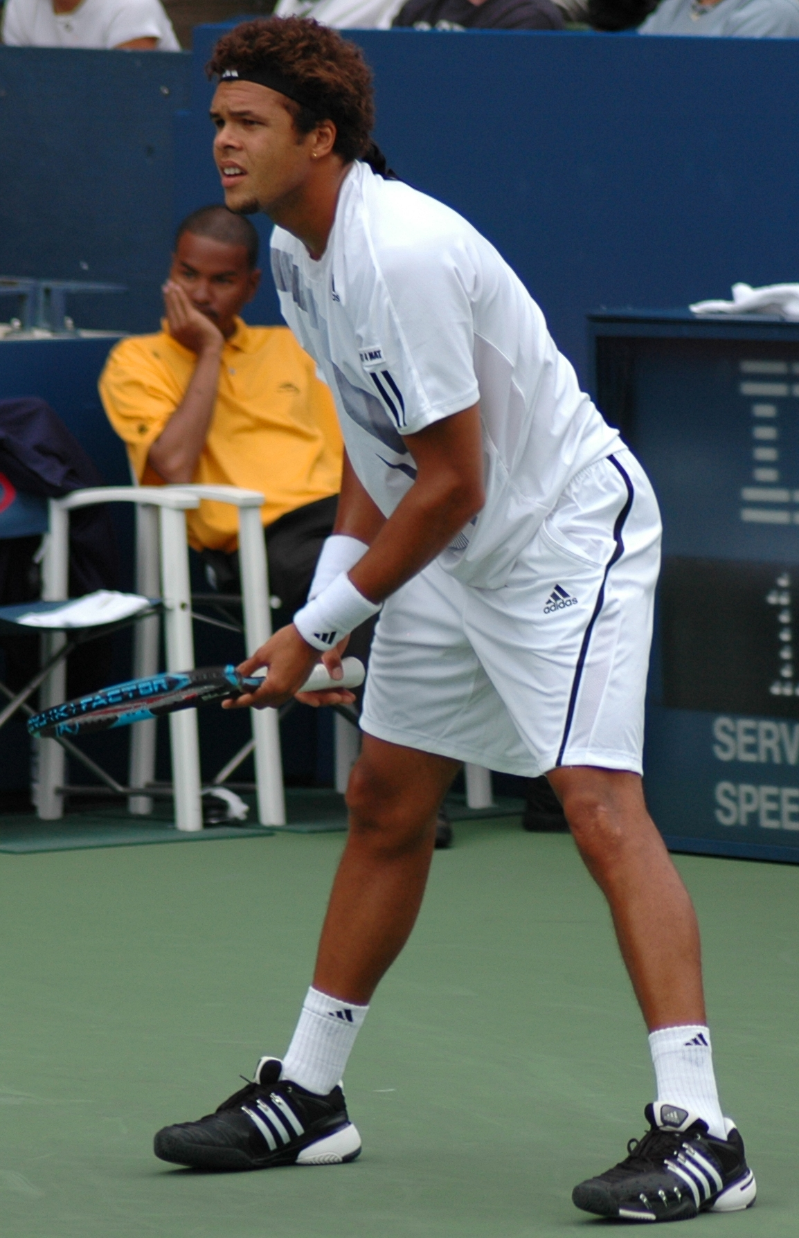 Jo-Wilfried Tsonga US Open 2009